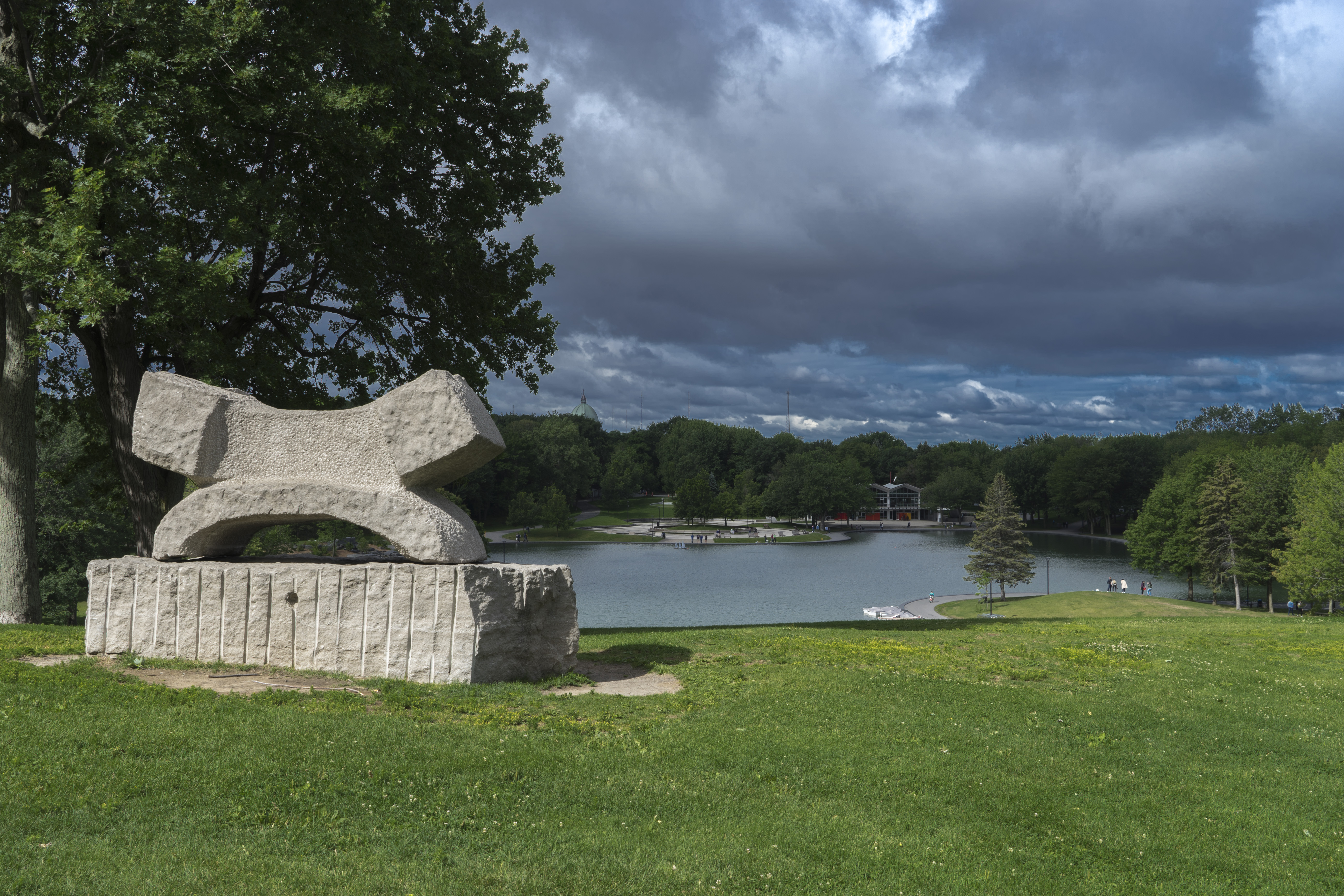 Beaver Lake, Montreal